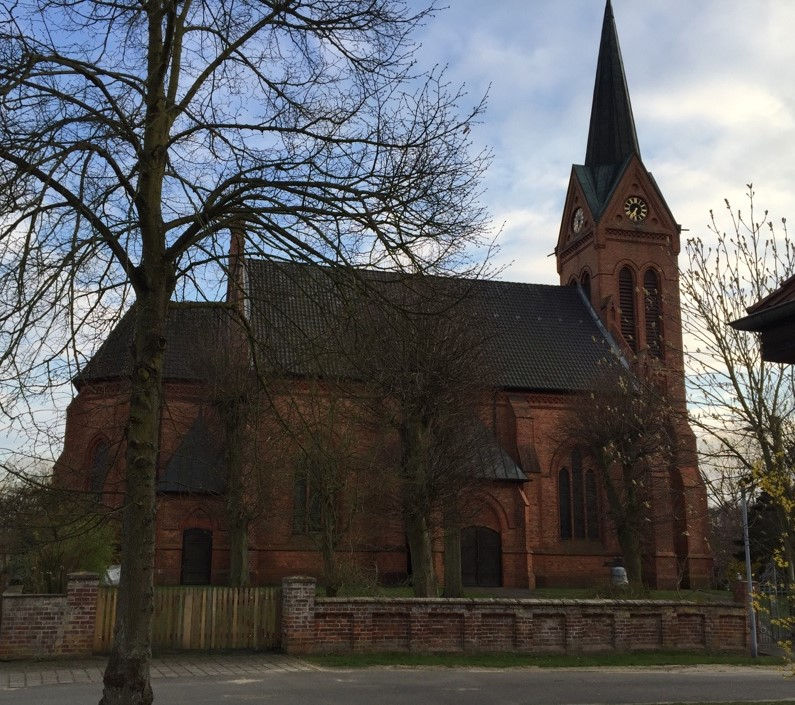 St.-Dionys-Kirche in Lehmke, Backsteinbau in neugotischem Stil